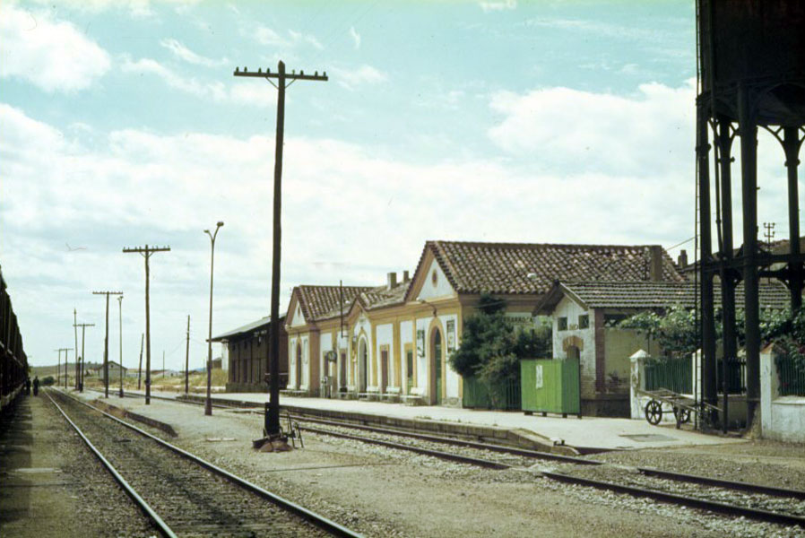 Estación de Peñarroya-Pueblonuevo, en 1979.